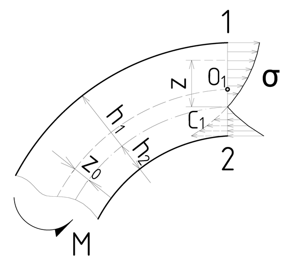 Напряжения в кривой балке